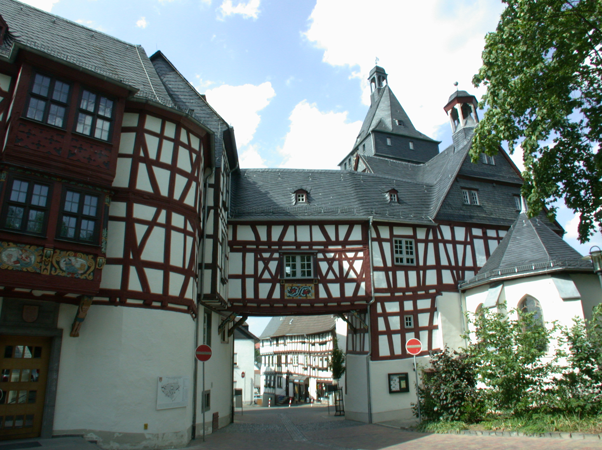 Amthof, Bad Camberg, Deutschland, Südostfassade